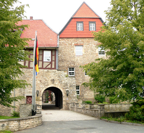 Burg Warberg Foto aufgenommen von Benutzer Benutzer:Axel Hindemith, Juni 2006